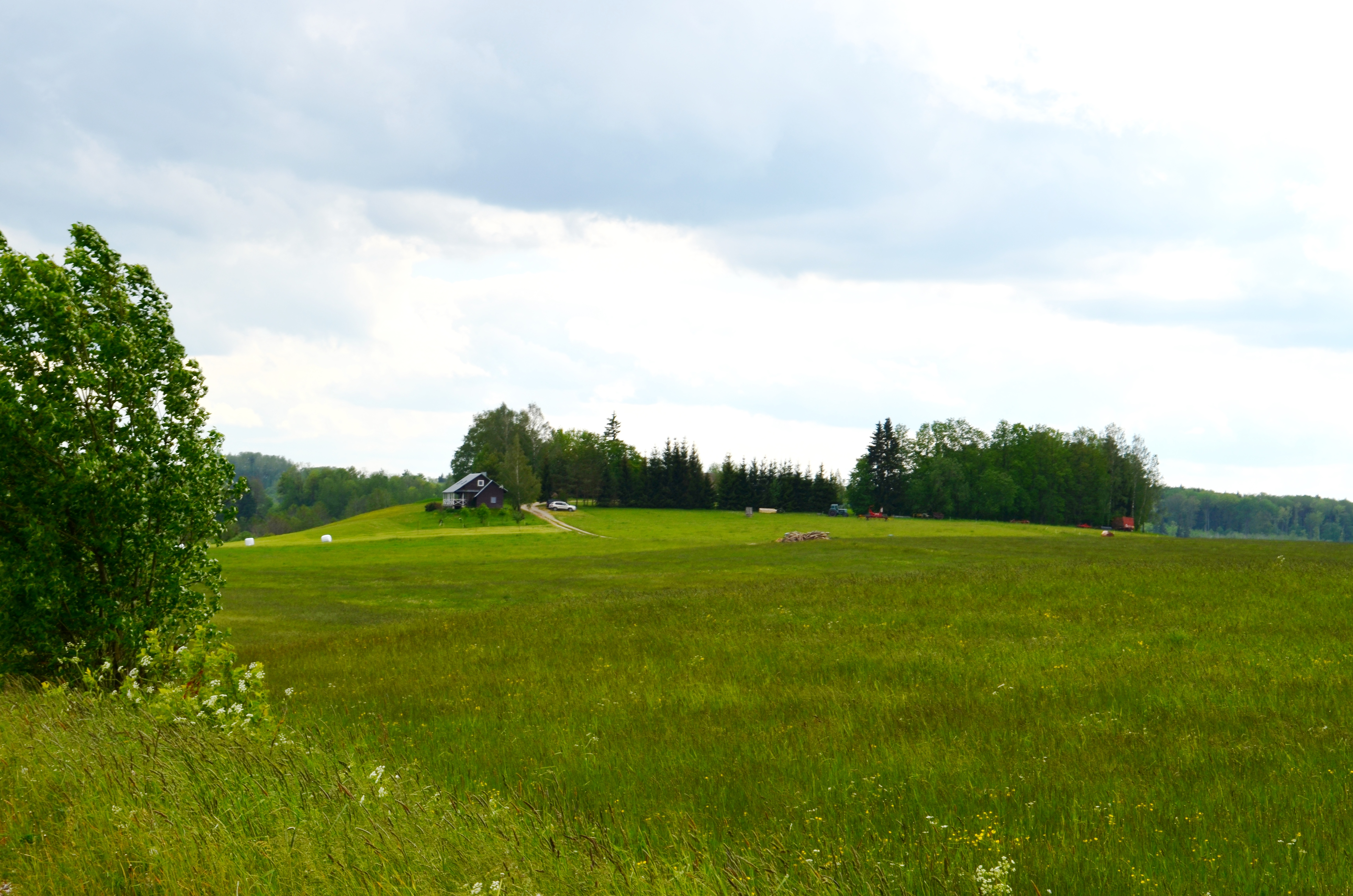 Sodyba prie Rubikių ežero, Rubikiai, Anykščių raj.